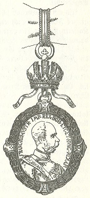 Scan van Blz. 287 van het boek "Handbuch der Ritter- und Verdienstorden " uitgegeven 1893 door Weber.Tekening van de in 1902 overleden Maximilian Gritzner. Robert Prummel 10 jul 2008 16:40 (CEST)